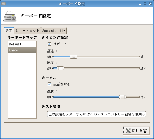 Keyboard Setting (xubuntu 6.10)